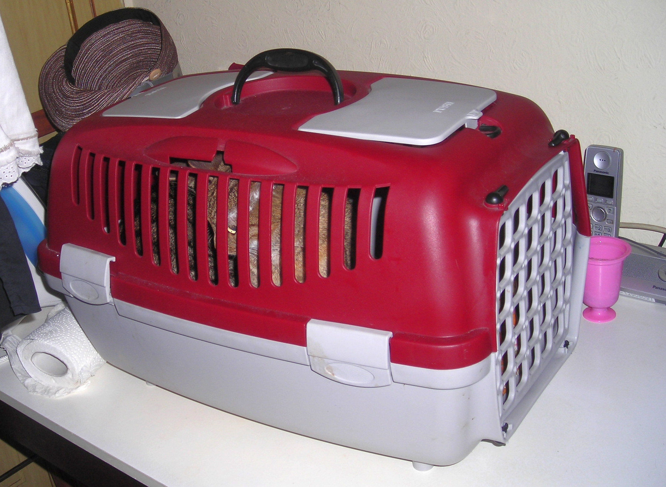 Katzentransportbehälter (rot-hellgrau)